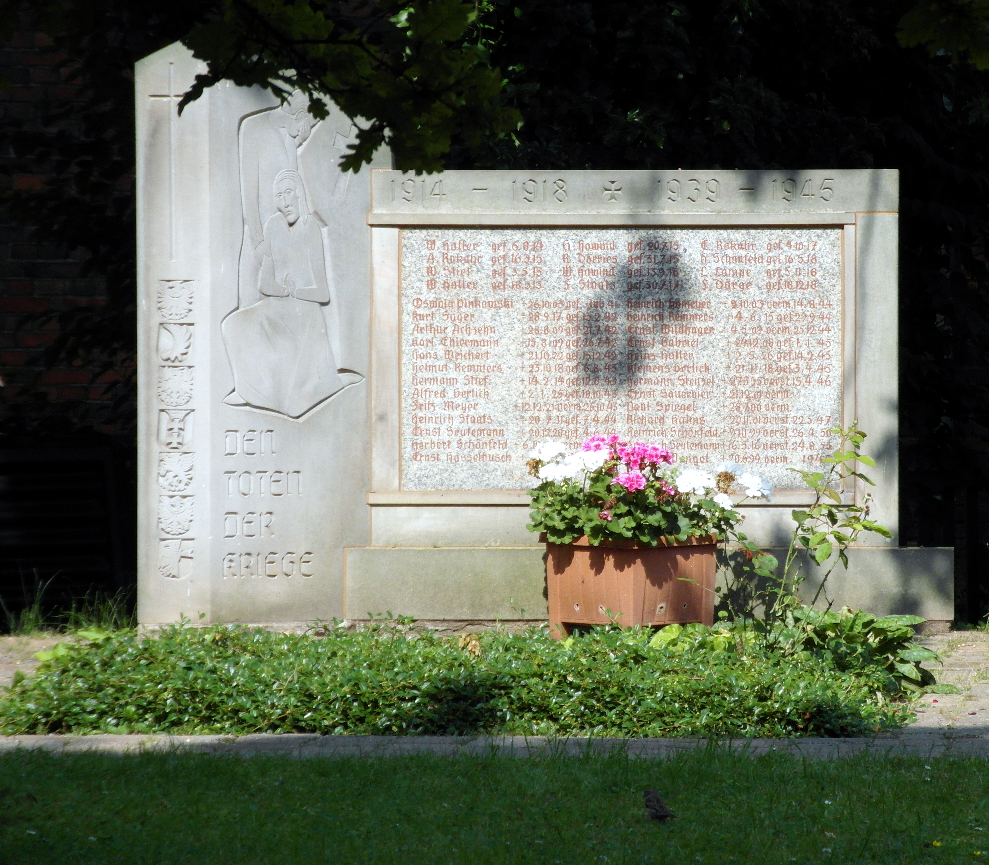 Gedenkstätte (Kriegerdenkmal) an der Kapelle Sorsum; Foto von der "Dorfstrasse" aus